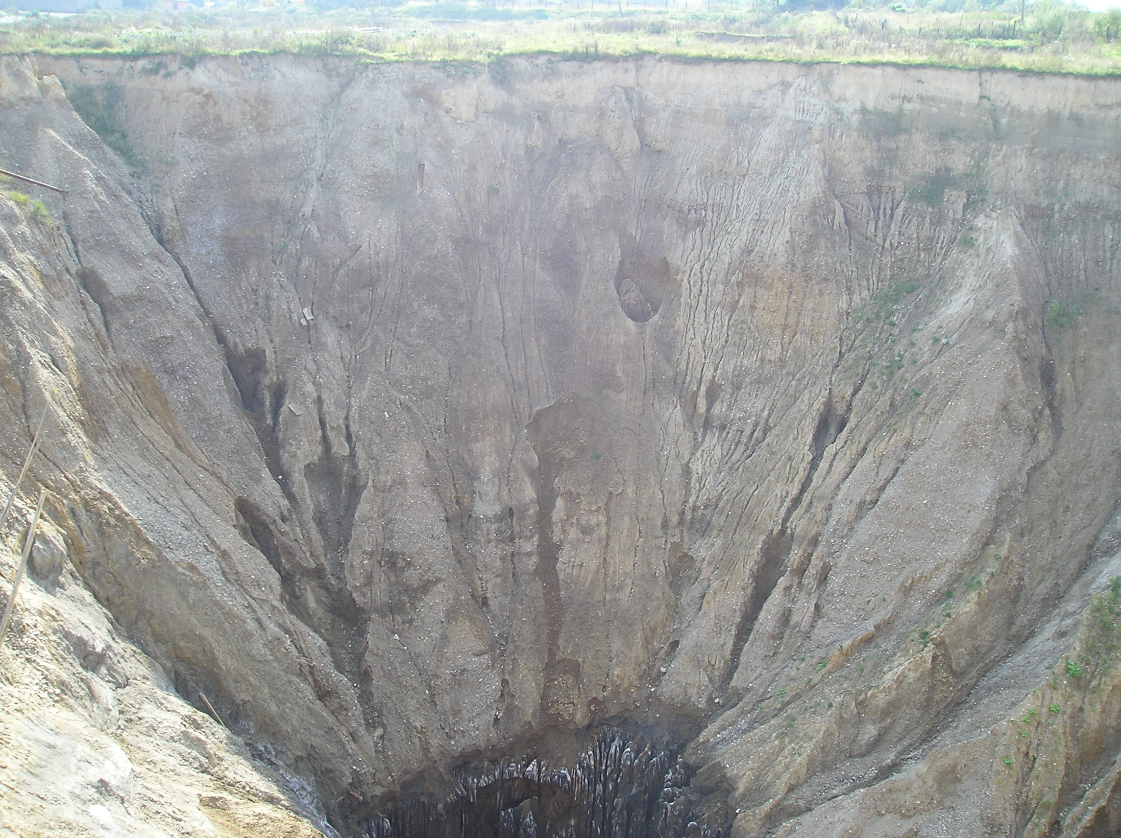 Україна-Закарпатська область-Солотвино-Покинута шахта